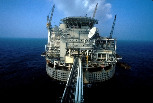 Fra Ekofisk-feltet